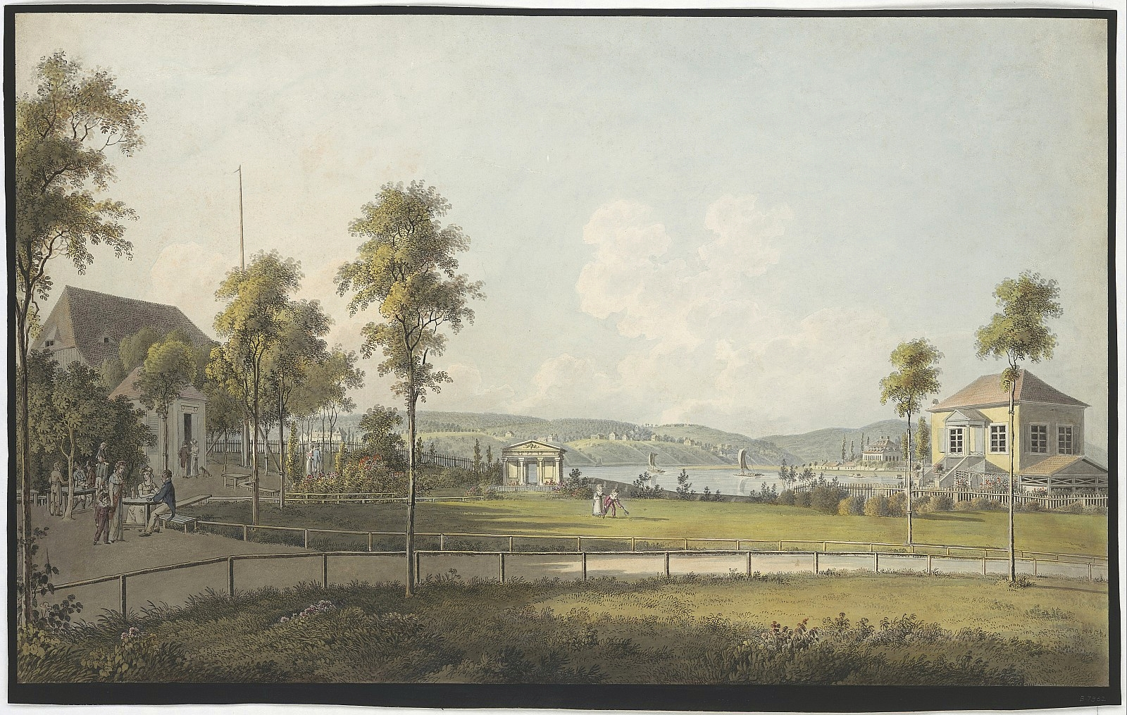 Wizani, Johann Friedrich: Dresden, Linckesches Bad mit Blick über die Elbe auf Antons Garten, - 1 Kunstbl. : kolorierte Radierung, 59 x 37 cm